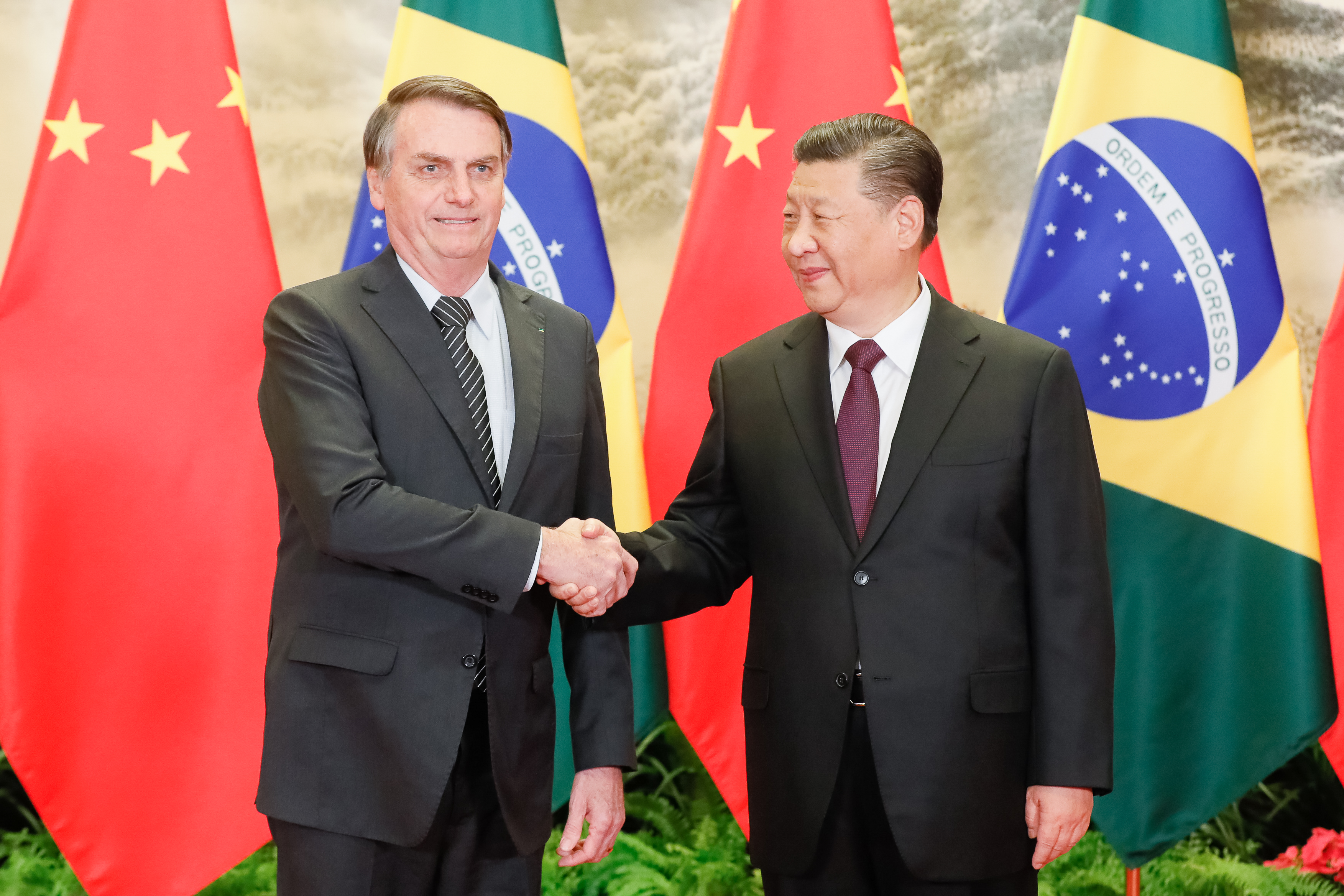 (Pequim - China, 25/10/2019) Presidente da República, Jair Bolsonaro, acompanhado do Senhor Xi Jinping, Presidente da República Popular da China, posam para fotografia.Foto: Isac Nóbrega/PR